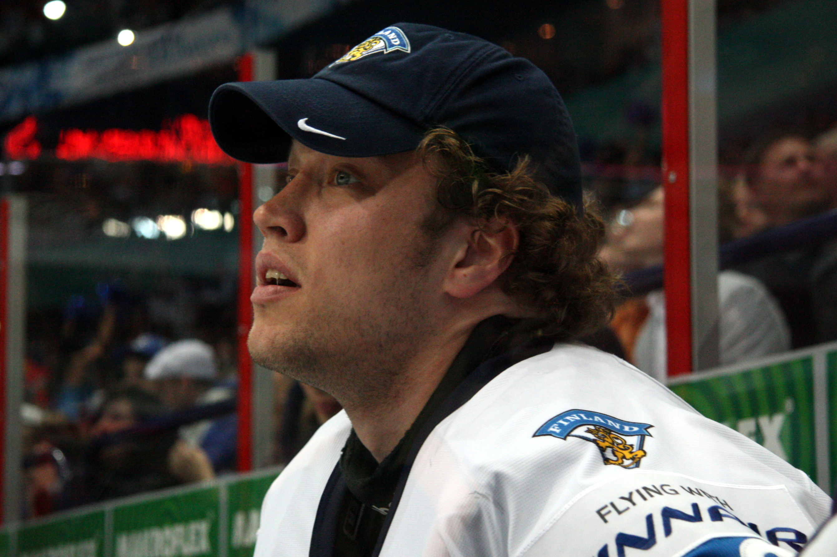 Карри Рамо на скамейке запасных сборной Финляндии. ЧМ 2012, Полуфинал, 19.05.2012, Финляндия-Россия, Хельсинки.